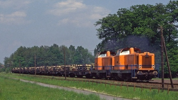 Doppeltraktion V 132 und V 131 der Teutoburger Waldeisenbahn/TWE vor dem "Bentelerzug" Hanekenfähr/Lingen - Paderborn Neuhaus